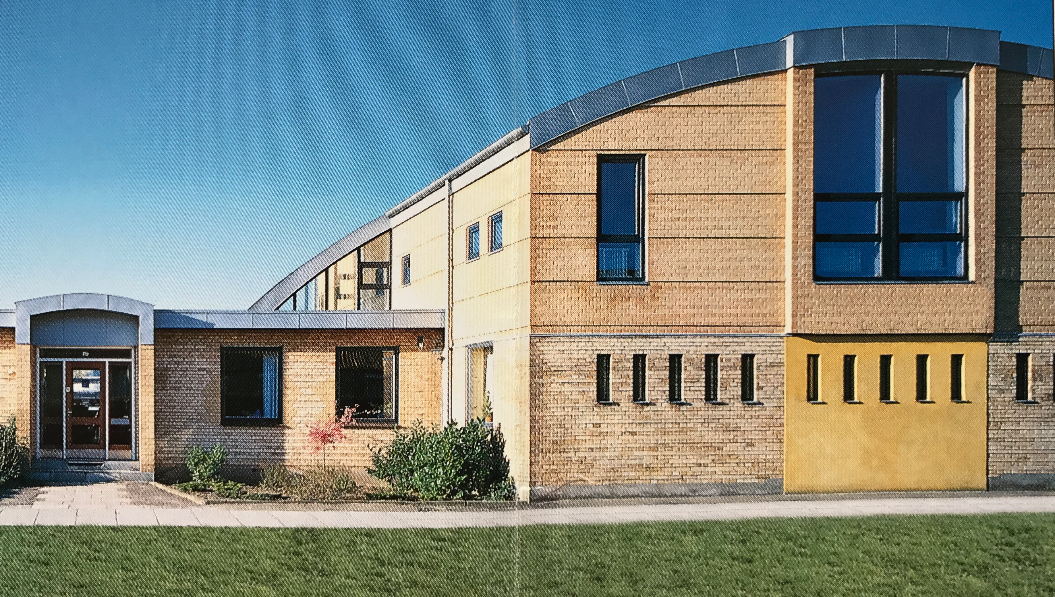 Arkitekt E. Høvring Nielsen tegnede de nye værksteder og kontorer på Katrinebjergvej 115. Firmaet flyttede hertil i 1966.